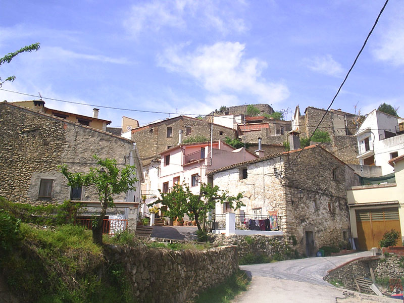 Planes, el Comtat, País Valencià